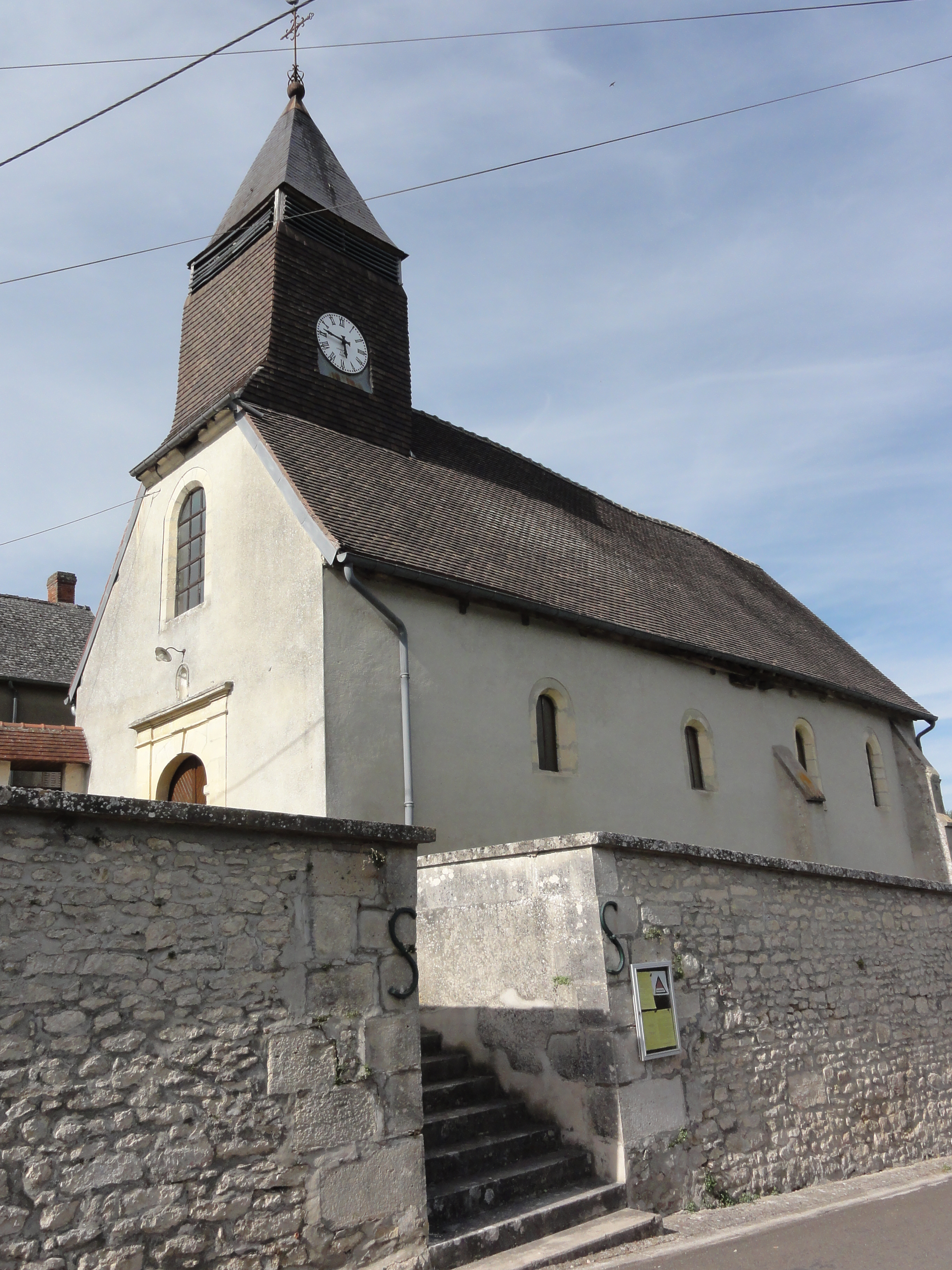 Courtrizy-et-Fussigny (Aisne) église